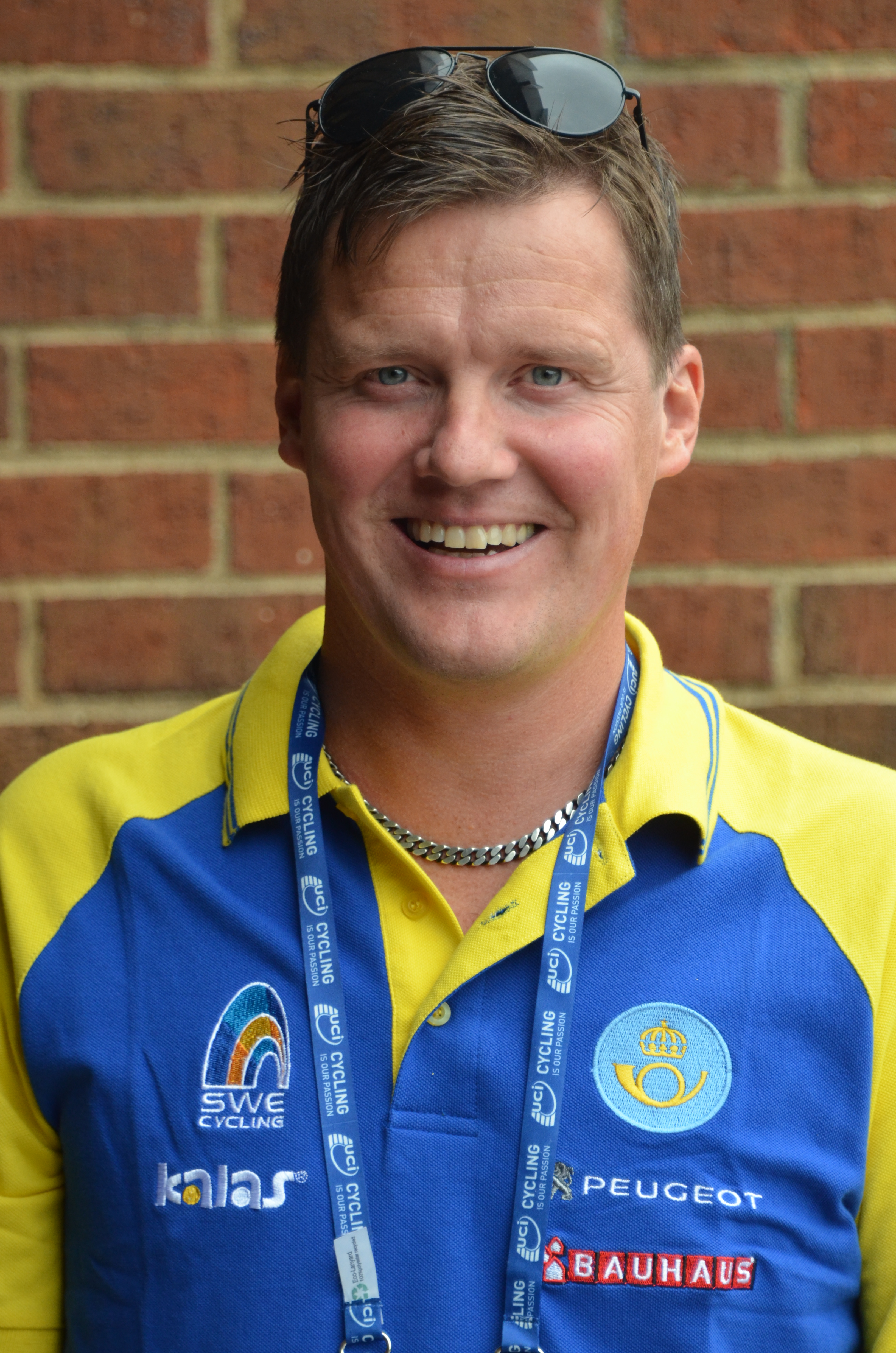 F.d. tävlingscyklisten Glenn Magnusson.